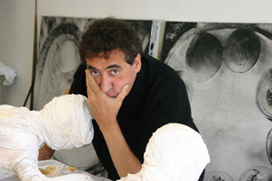 Retrat de lluís Vilà